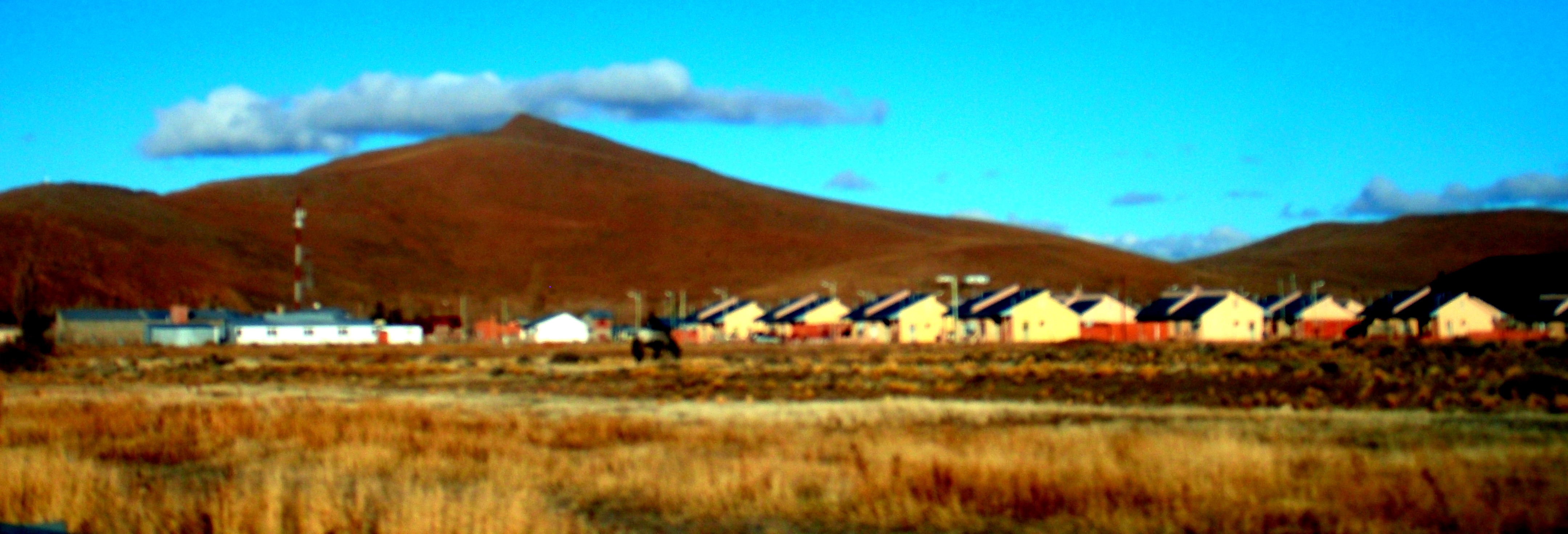 Geografía elevado rodea al poblado